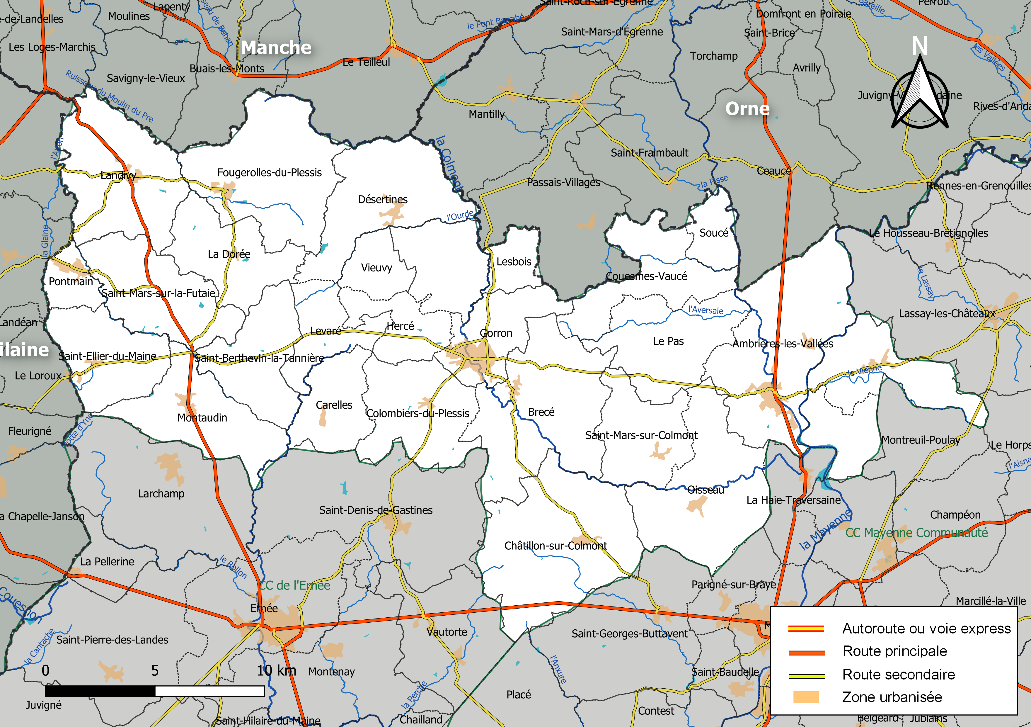 Carte géographique de la Communauté de communes du Bocage Mayennais, département de la Mayenne, France. Composition au 1er janvier 2019.